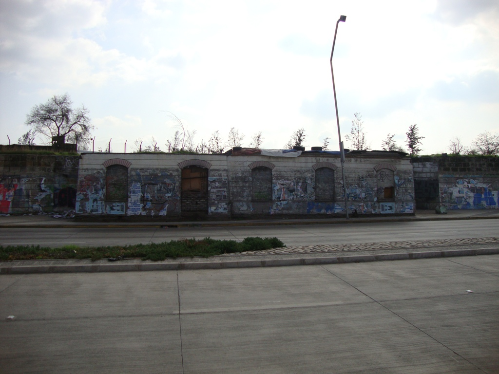 Antigua estación del Ramal de Circunvalación Yungay, actualmente cerrada y en ruinas.